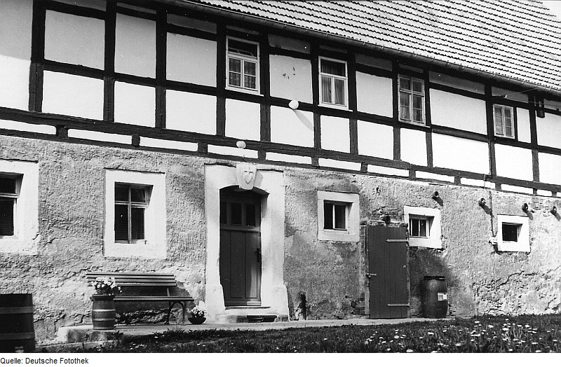 Original image description from the Deutsche Fotothek Reinsberg-Neukirchen. Funkes Mühle, Hofansicht